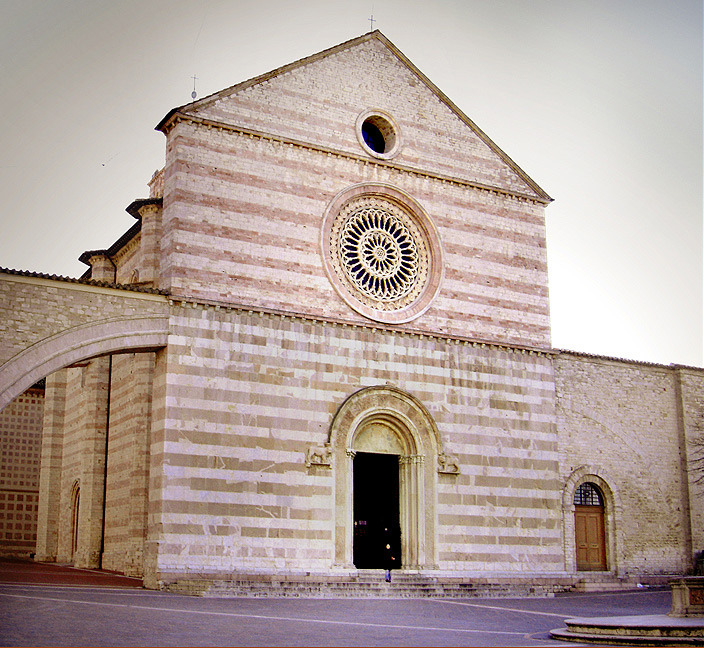 Basilica di Santa Chiara, Assisi.